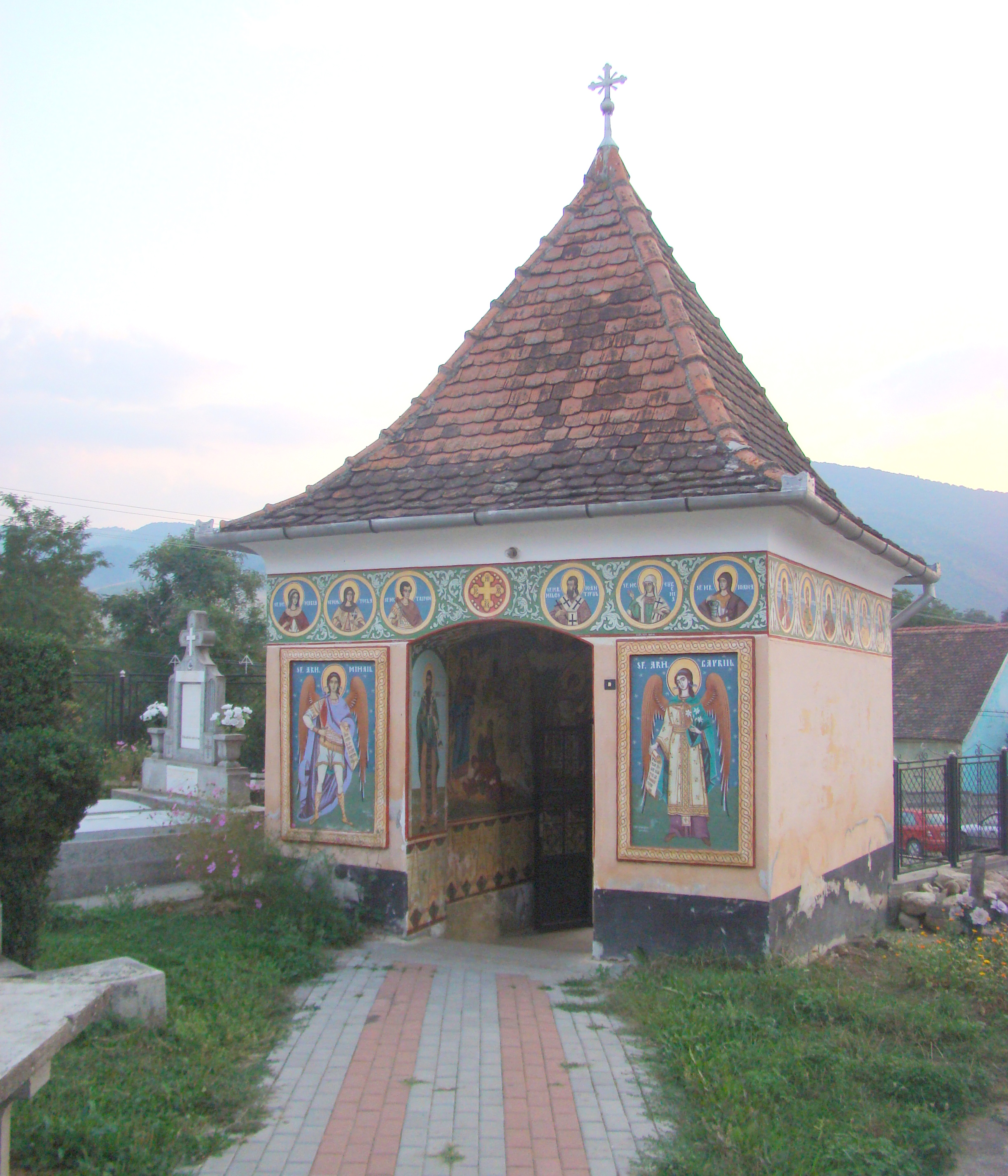 Biserica Sfântul Nicolae din Orlatt, județul Sibiu